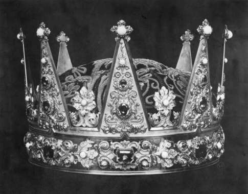 De norske kronregaliene. Kronprinsens krone, laget av gullsmed H.C. Øyseth, 1846, Christiania. Etter tegning av Flintoe. Fotografi av O. Væring. Fra Norsk Folkemuseum